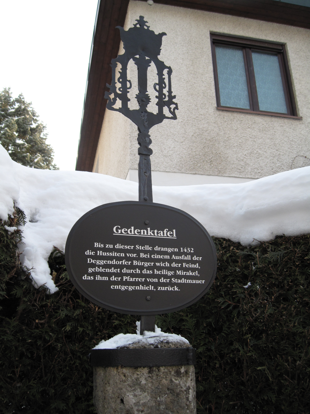 Deggendorf, Stadt-Au: Hussiten durch Mirakel der Deggendorfer Gnad gestoppt(Überlieferung)